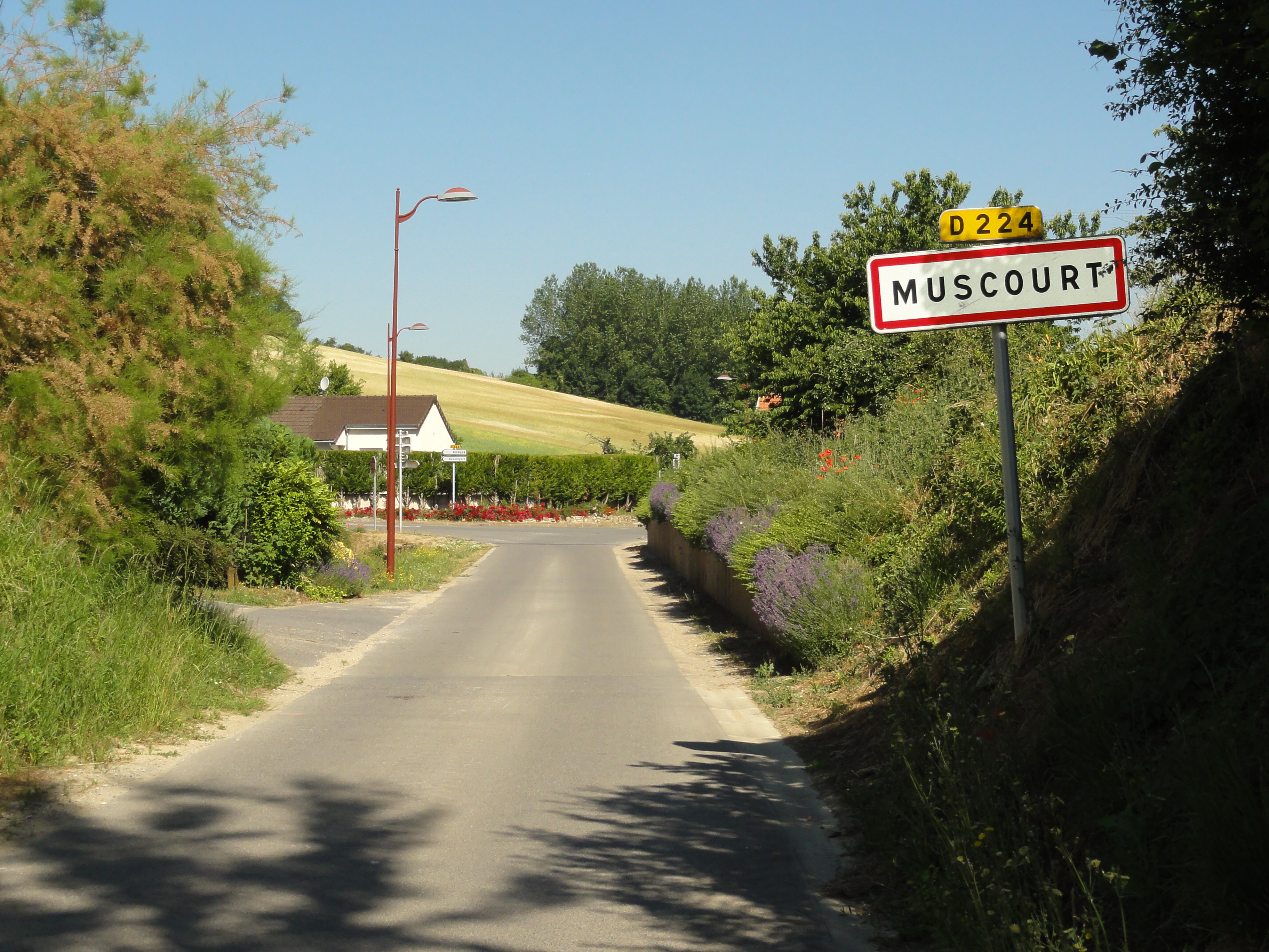 Muscourt (Aisne) city limit sign